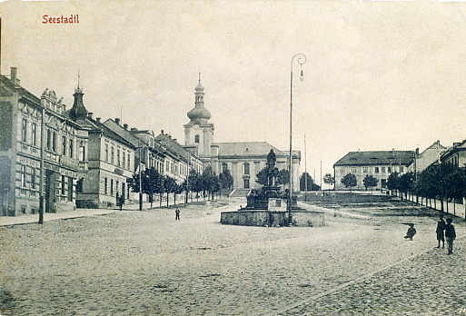 Náměstí v Ervěnicích, v pozadí kostel